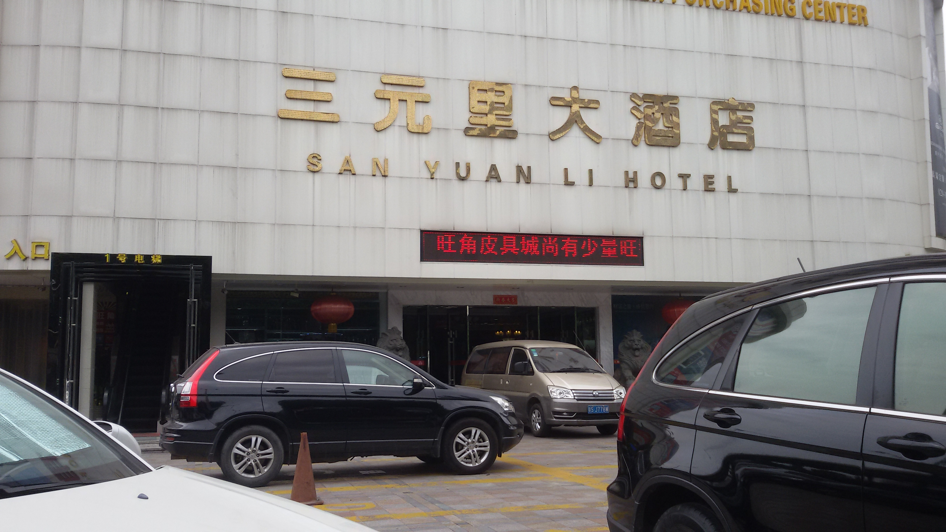 粵語: 三元里大酒店